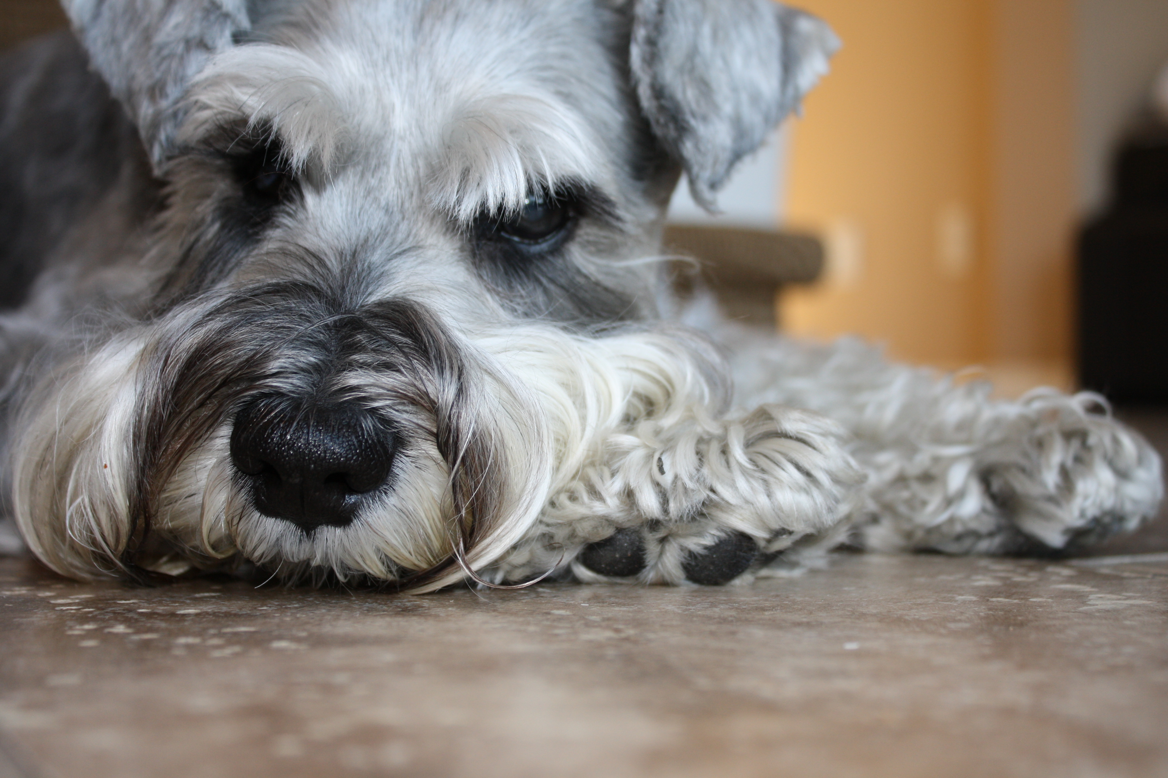 Schnauzer